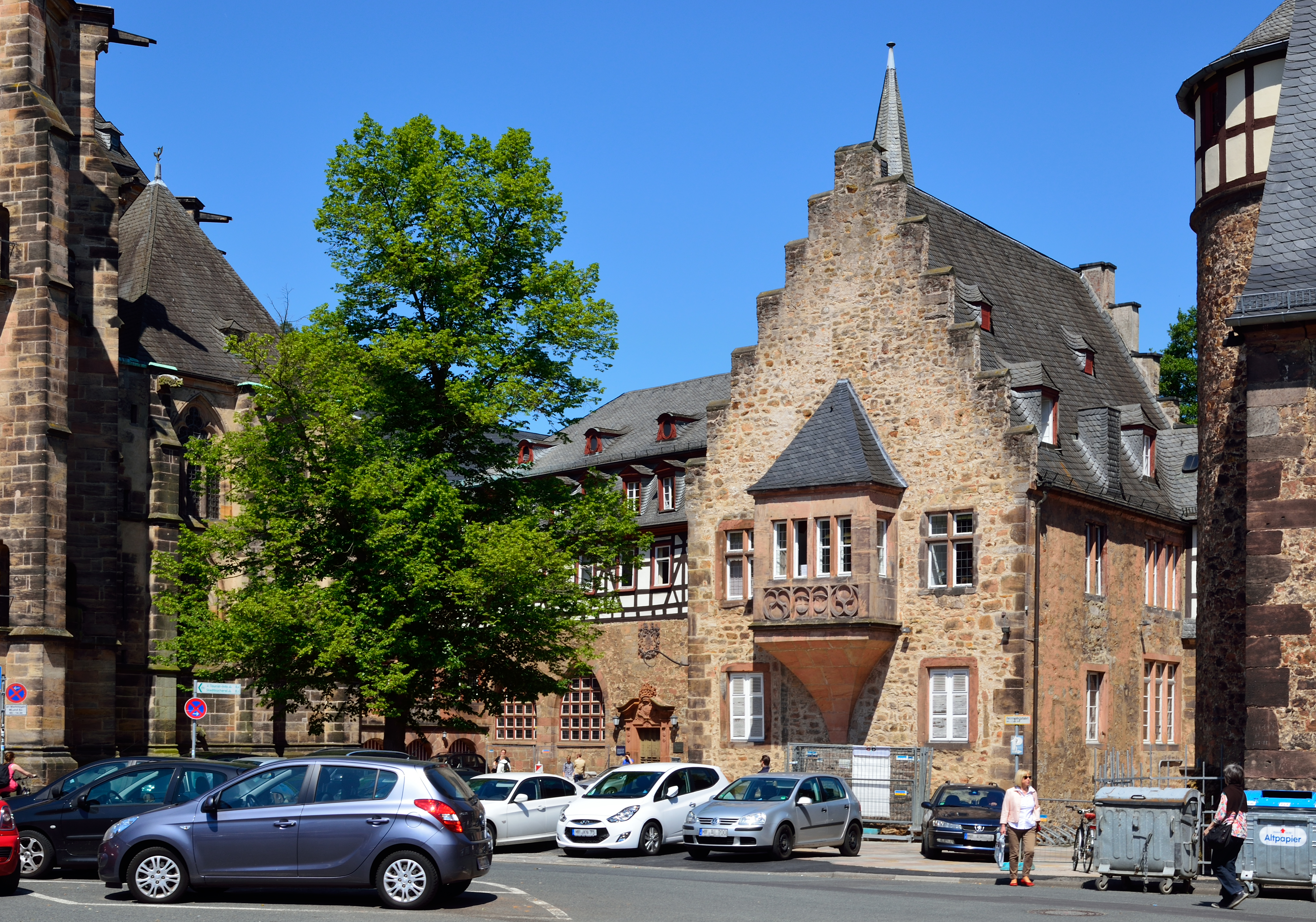 Ostflügel des Deutschordenshauses in Marburg am Firmaneiplatz/Deutschhausstraße. Links die Elisabethkirche, rechts das Kornhaus mit dem Mineralogischen Museum.